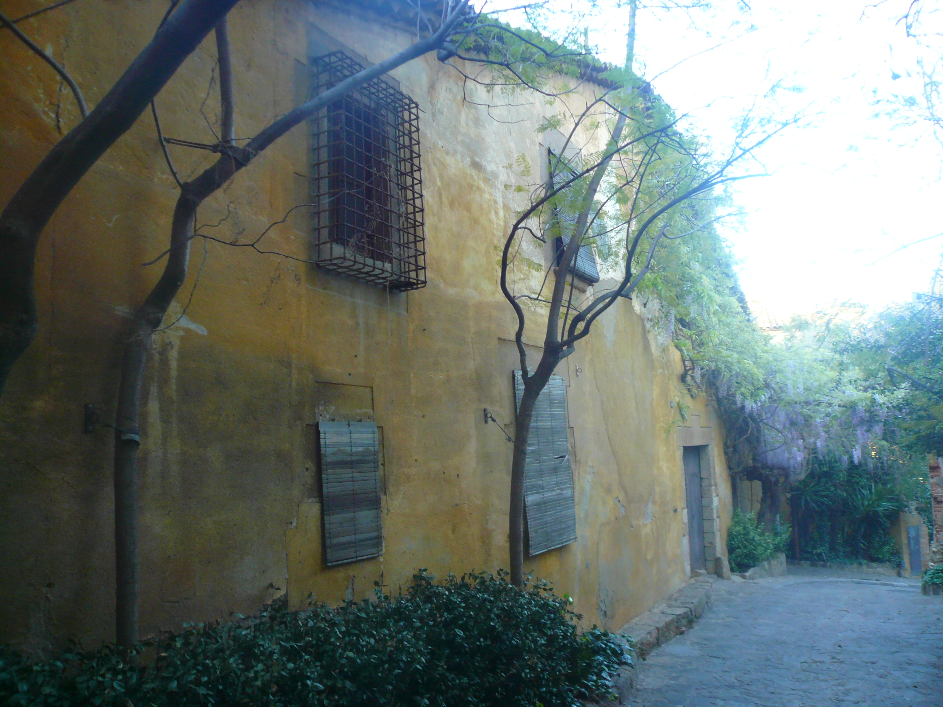 Carrer de Montserrat (Esplugues de Llobregat) Object location41° 22′ 43.18″ N, 2° 05′ 22.32″ E